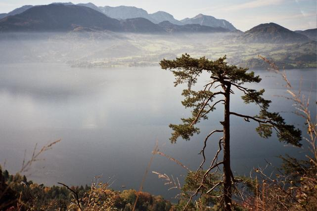 Traunsee und Höllengebirge